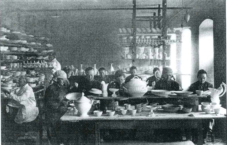 Το εργοστάσιο κατά το 1930